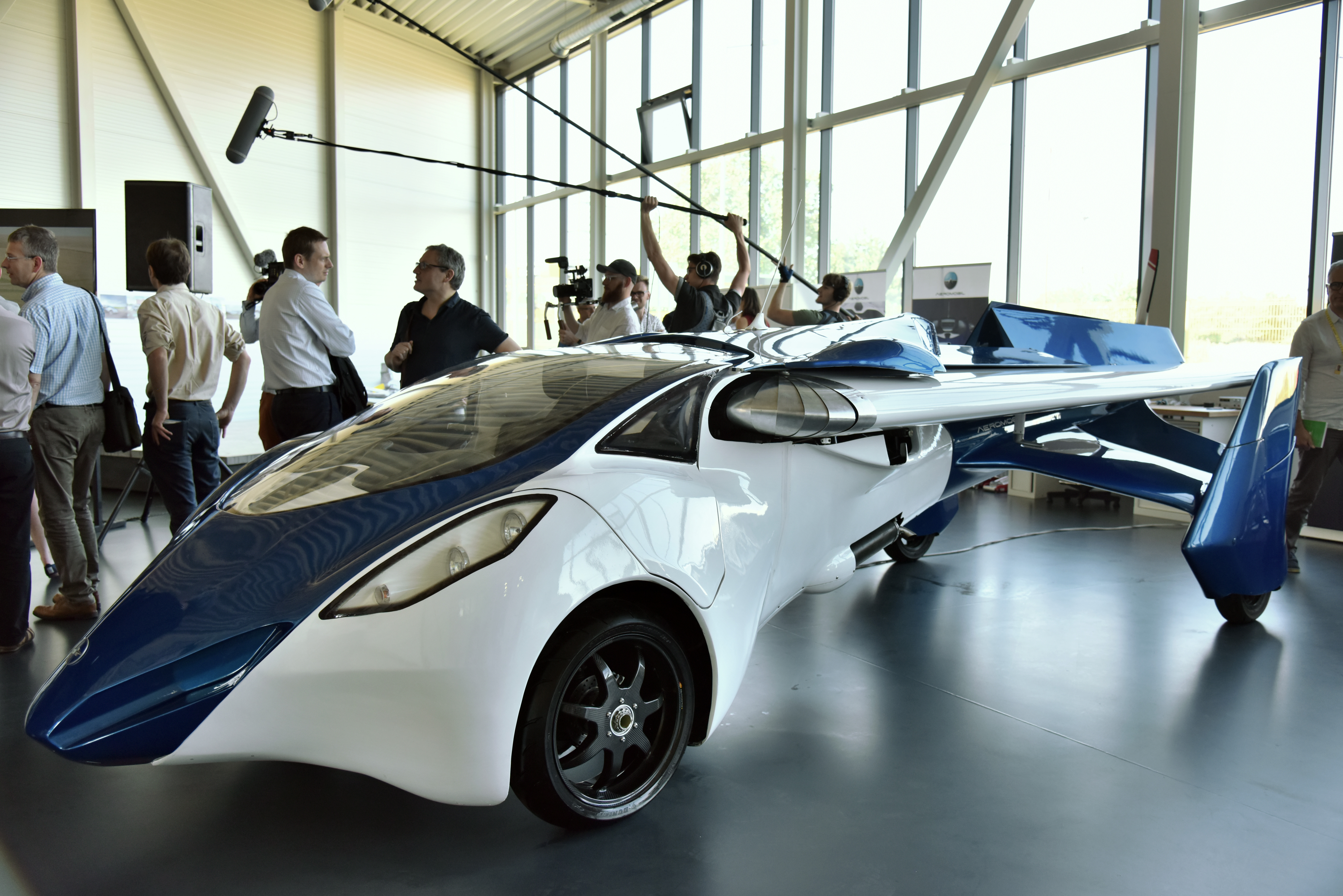 ph: halime sarrag